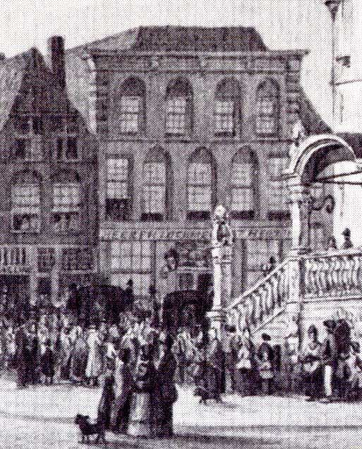 Het Herthuys op de Markt van Gouda - detail van een grotere afbeelding van de Markt met stadhuis (aquarel)